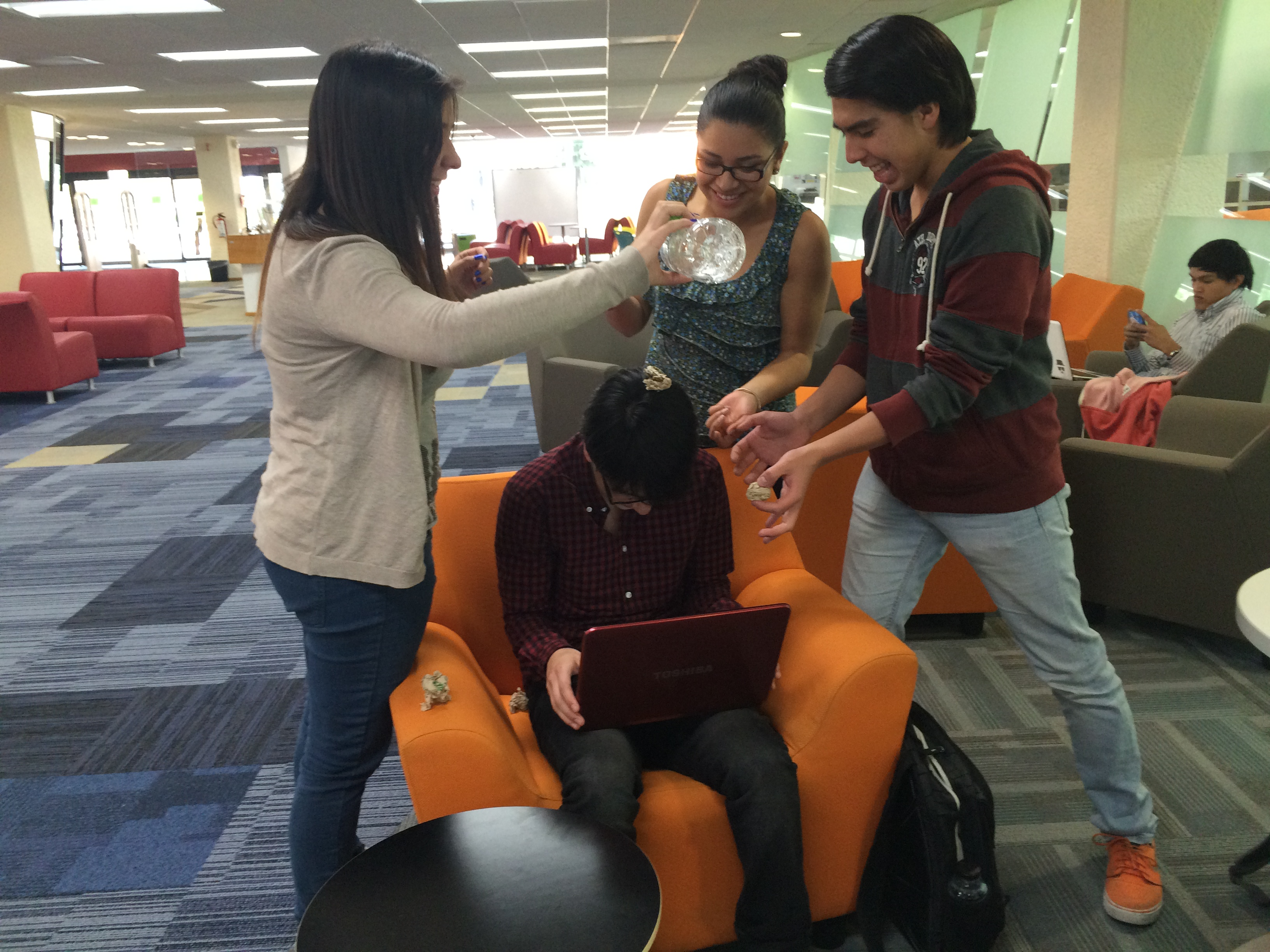 El Bullying puede ser físico. Este tipo de bullying se puede manifestar con golpes, empujones, patadas, etc.